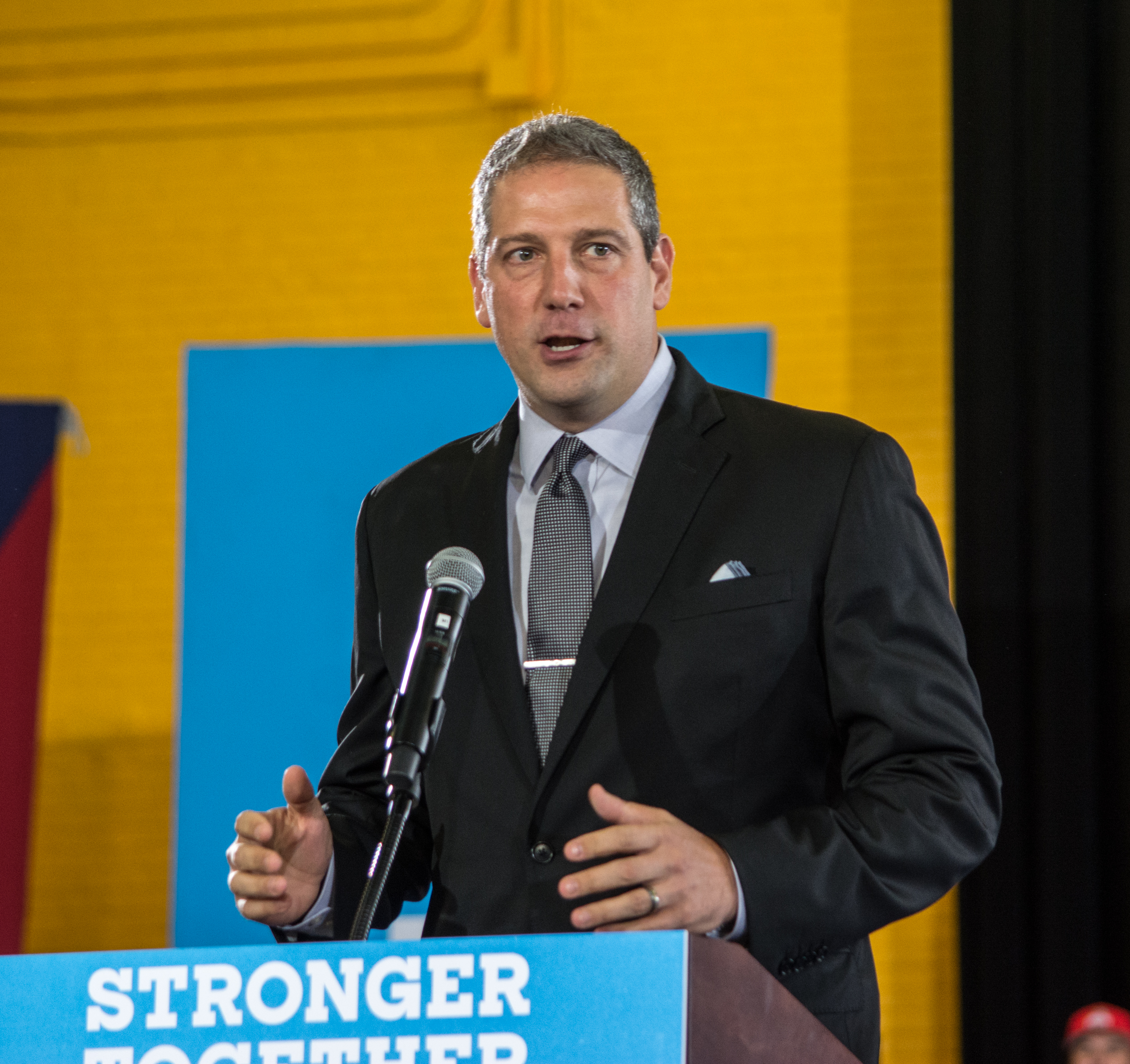 Rep Tim Ryan 01 - Akron Ohio - 2016-10-03